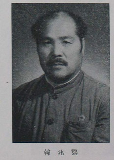 中國人民政治協商會議第一屆全體會議代表